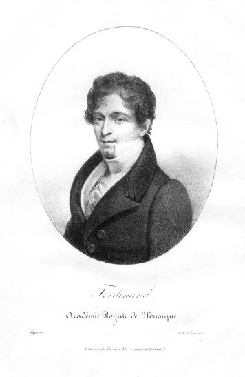 Ferdinand, danseur (1791-1837), lithographie de Vigneron (collection privée)